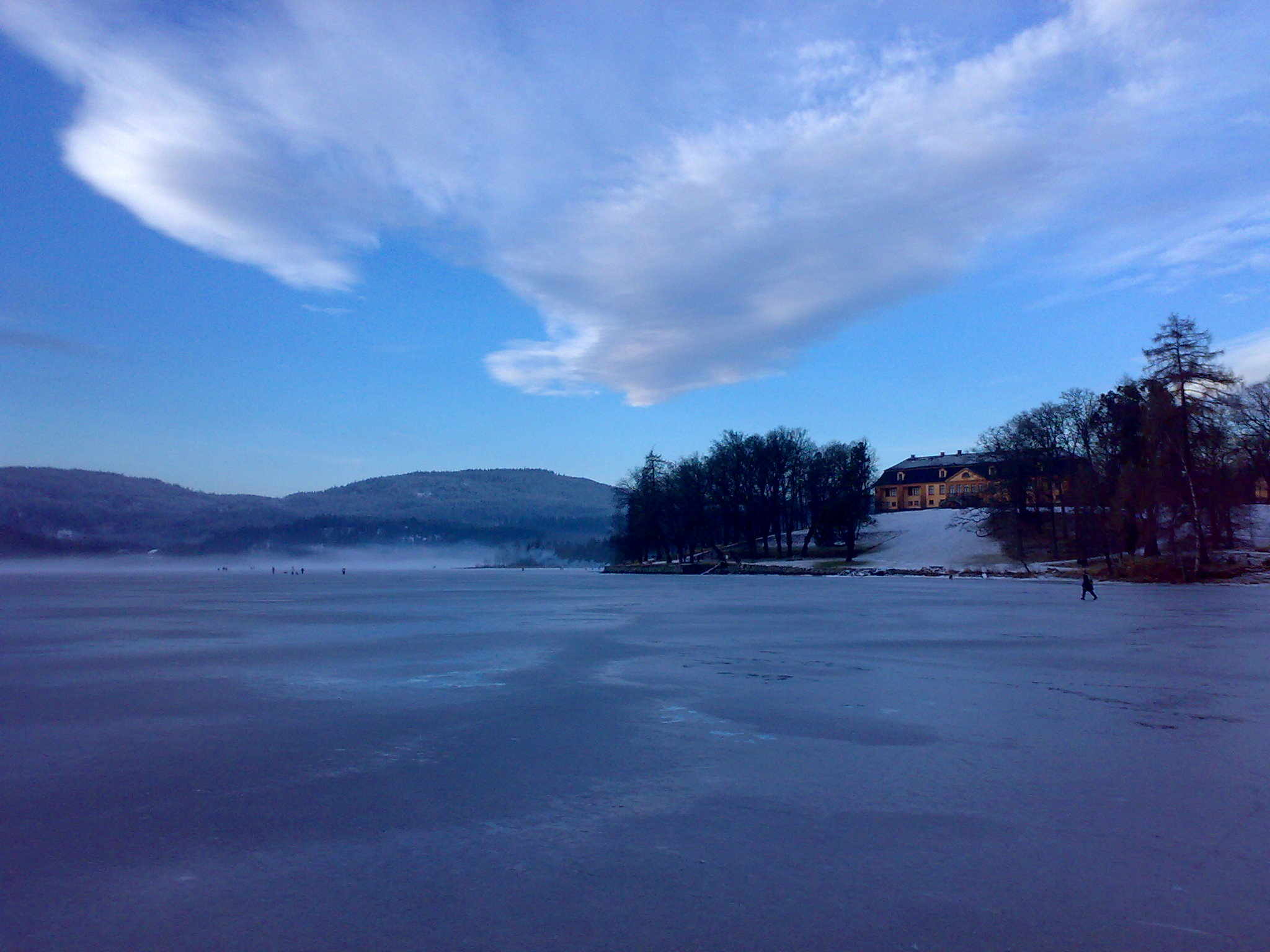 Bogstadvannet and Bogstad gaard by winter, 2007